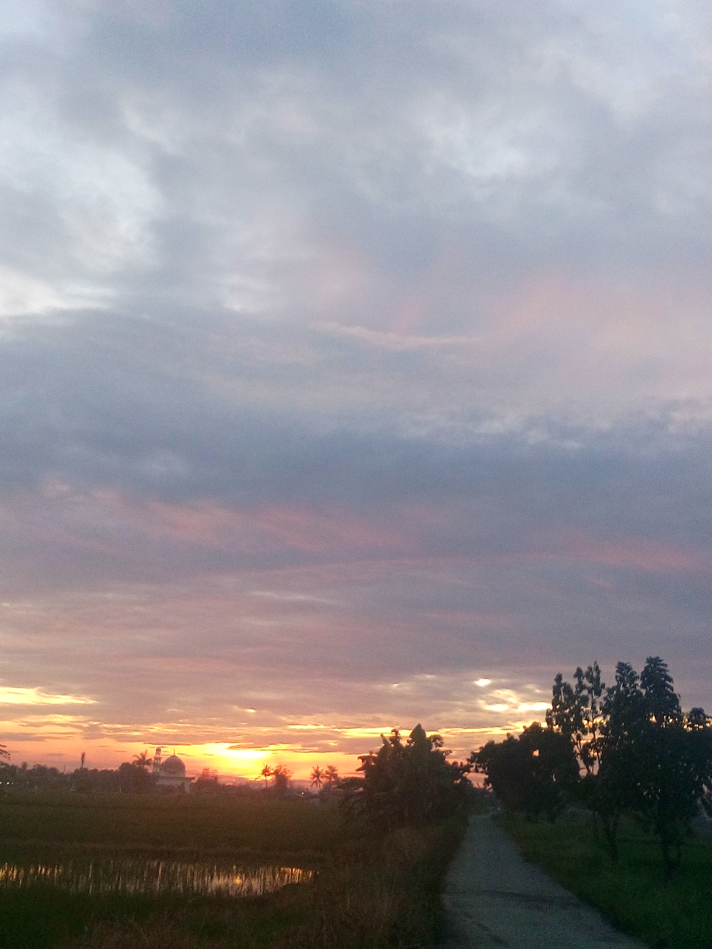 Pemandangan langit di dekat danau martubung